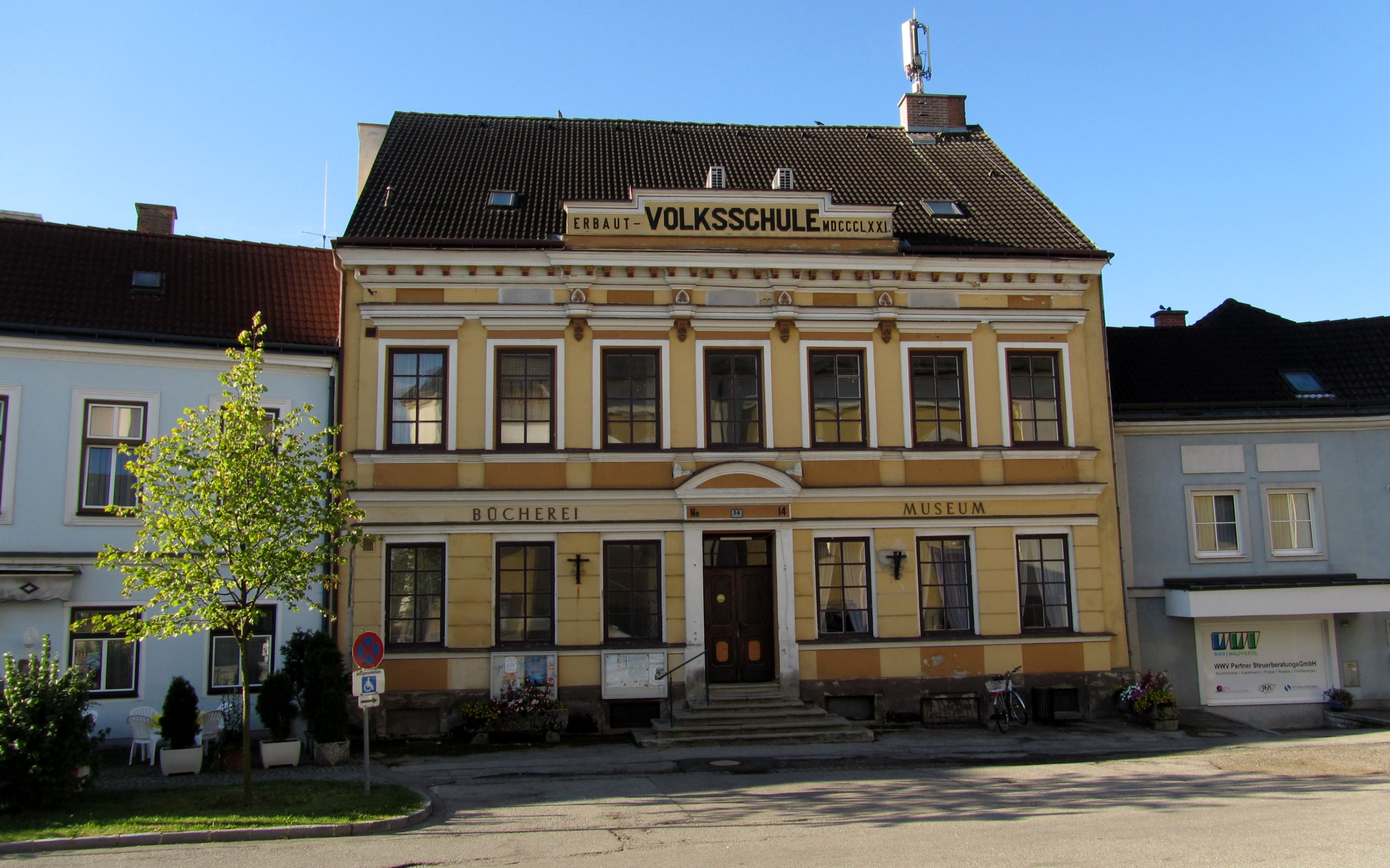 Heimatmuseum, ehem. Schule